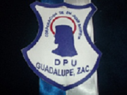 el logo